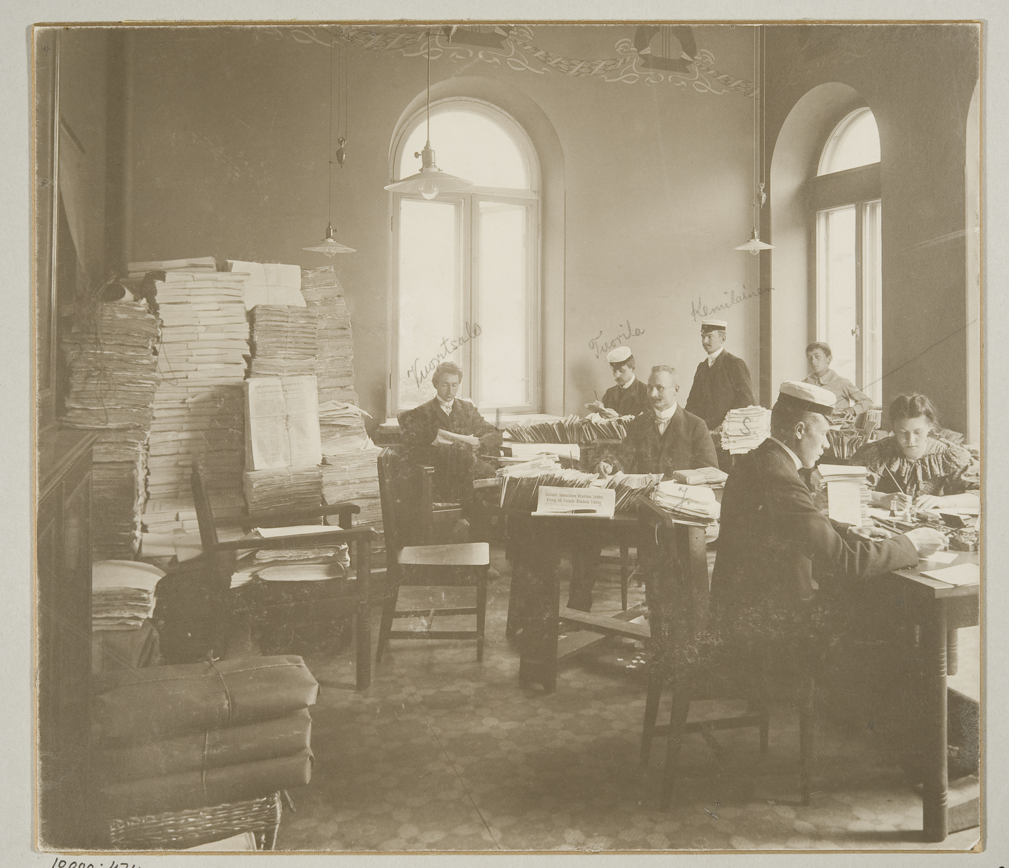 Sukunimien suomalaistamisliikkeen toimisto Vanhalla ylioppilastalolla vuonna 1906.